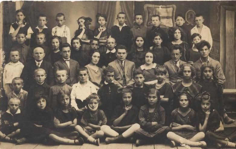 אהרון צרניצקי בשורת המורים, קיצוני מימין